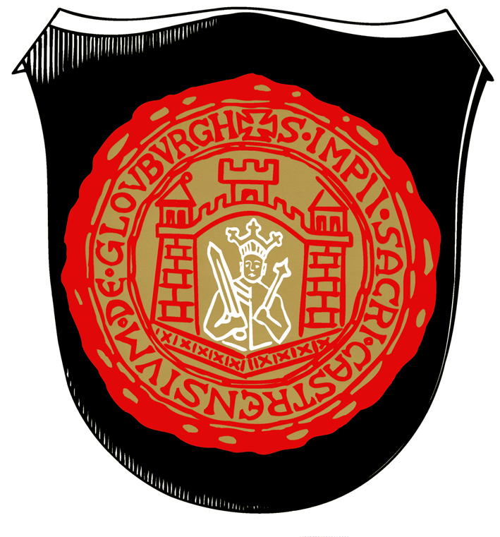 Wappen von Glauburg